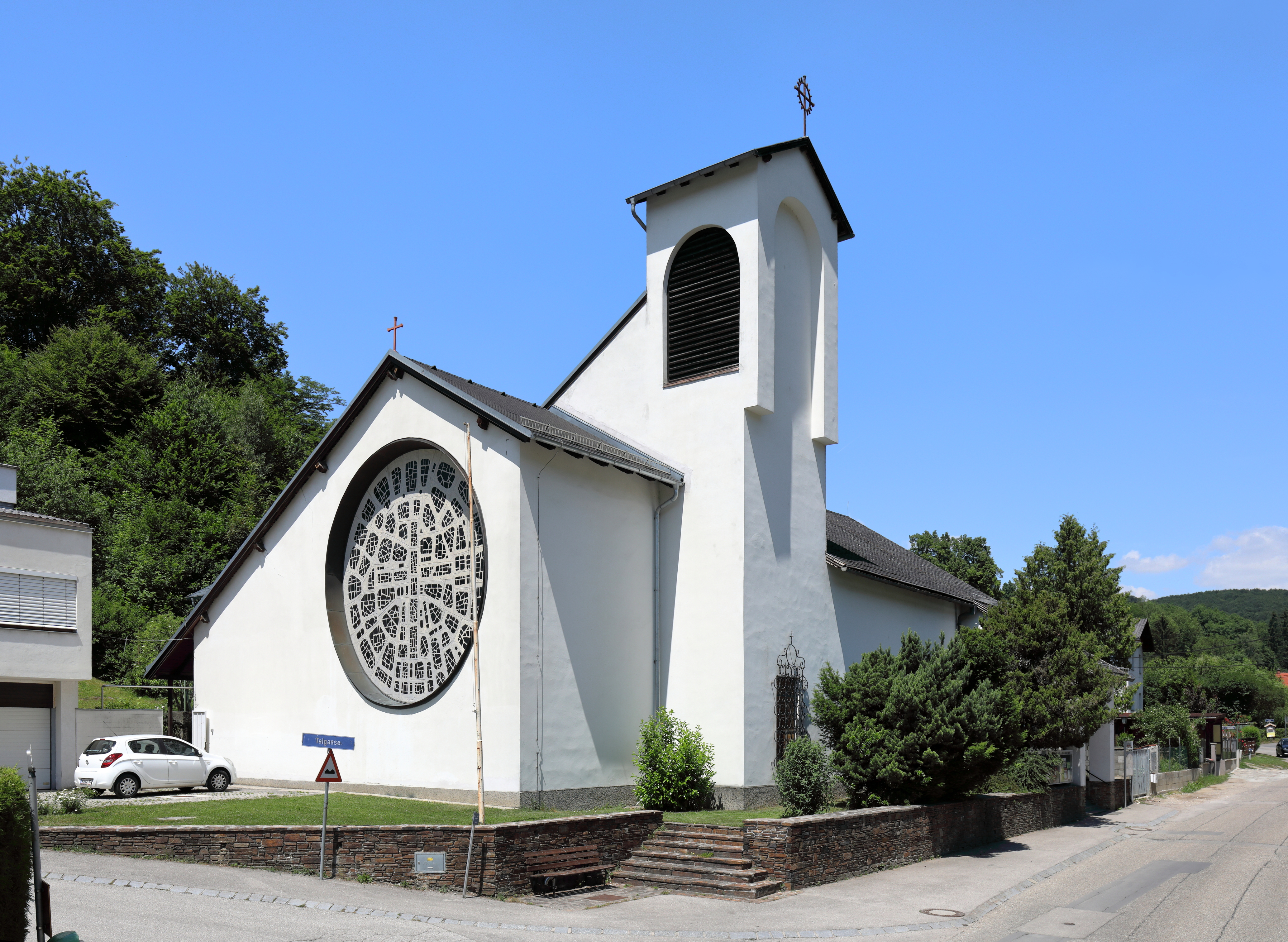 Die röm.-kath. Pfarrkirche Maria Rast in Untermauerbach, ein Ortsteil der niederösterreichischen Marktgemeinde Mauerbach. Die Nachfolgekirche einer 1937 errichteten kleinen Holzkirche wurde ab 1961 nach Plänen des Architekten Ladislaus Hruska errichtet und 1963 von Kardinal König geweiht. 1991 wurde Maria Rast zur eigenständigen Pfarre erhoben.